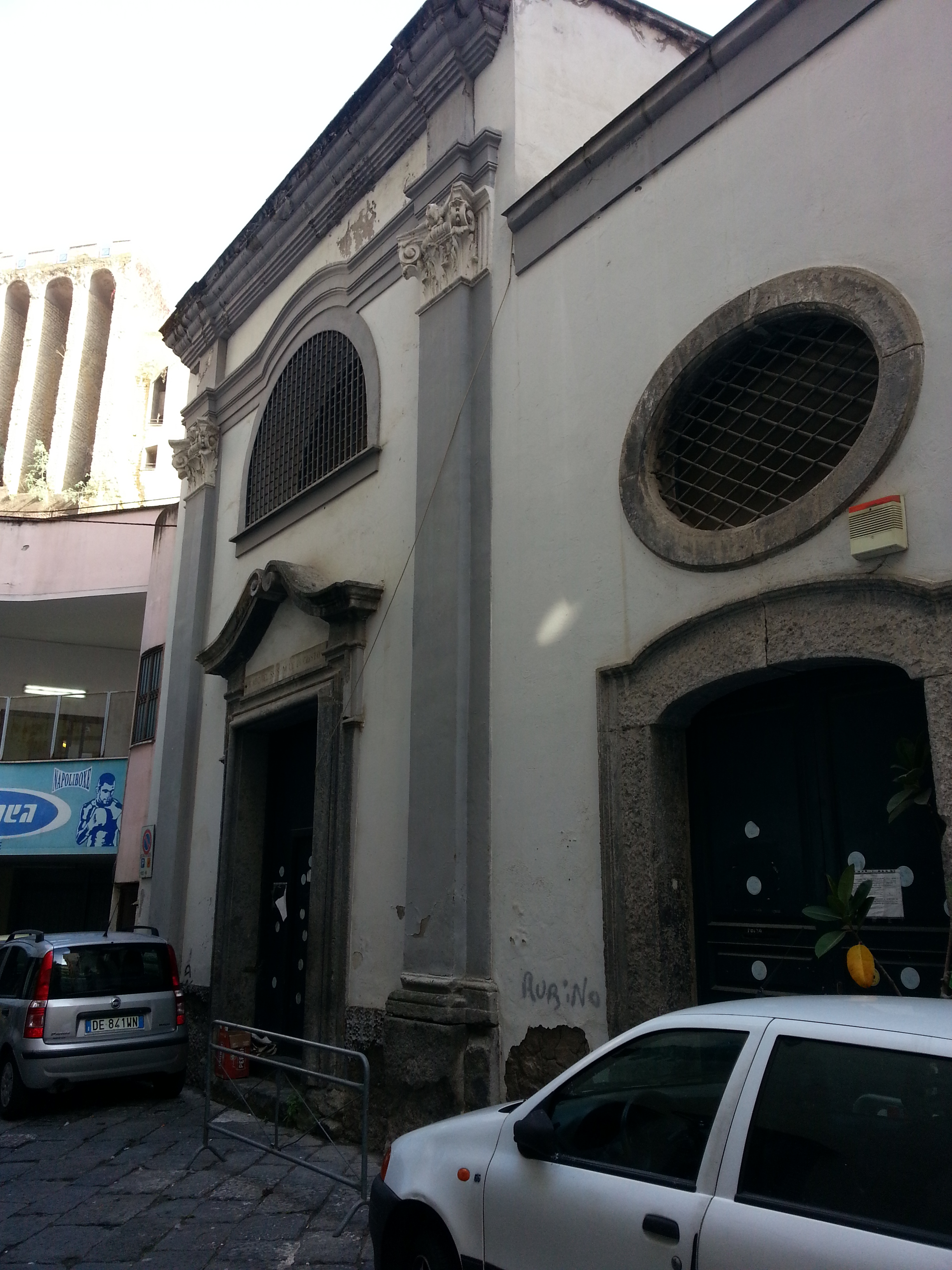 Facciata